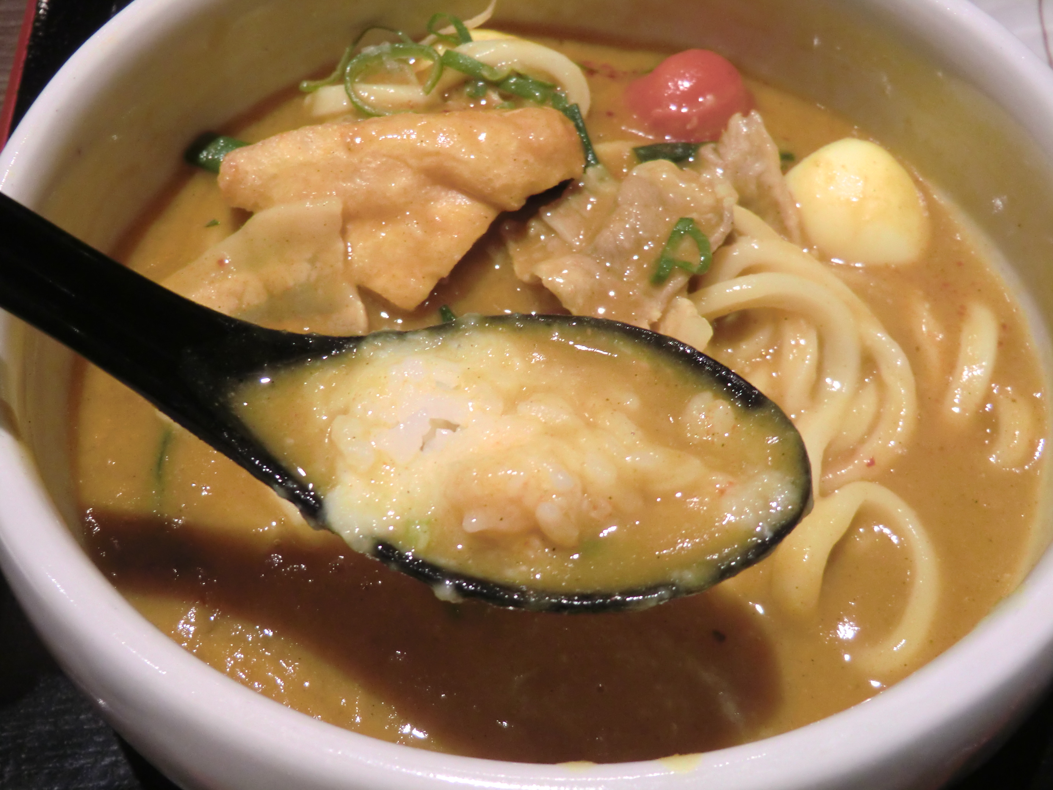 豊橋カレーうどん。みかわの郷カルミア店にて